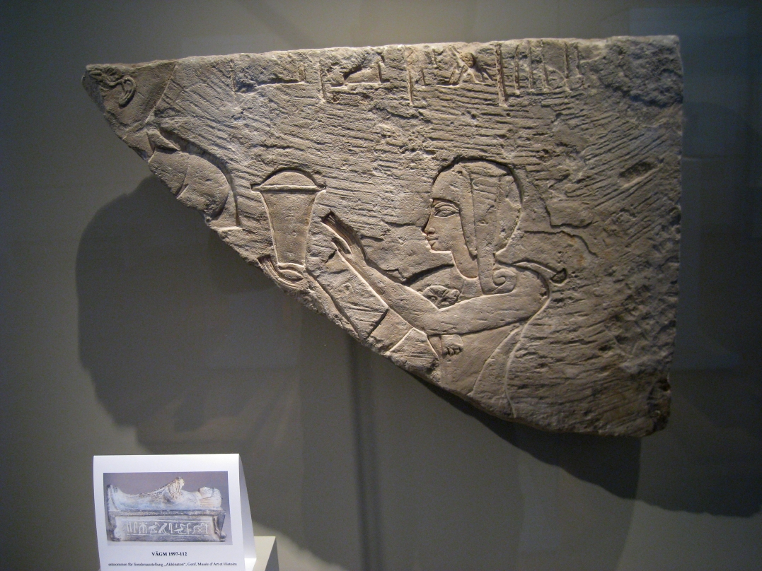 Relief représentant le prince héritier, Thoutmôsis, grand prêtre de Ptah et prêtre sem - Règne d'Amenhotep III - Musée égyptien de Berlin